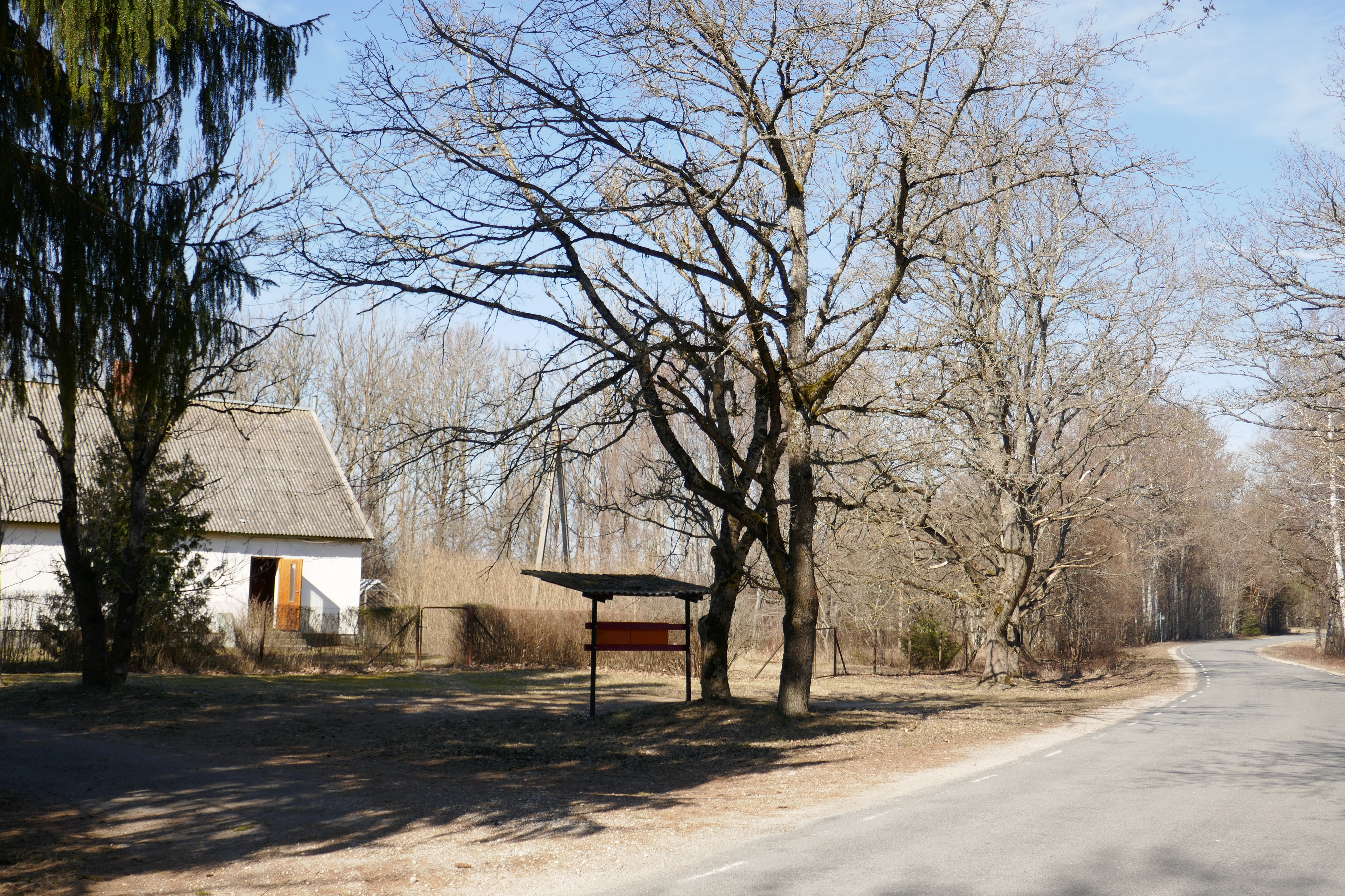 Pürksi keskaegse kalmistu asukoht